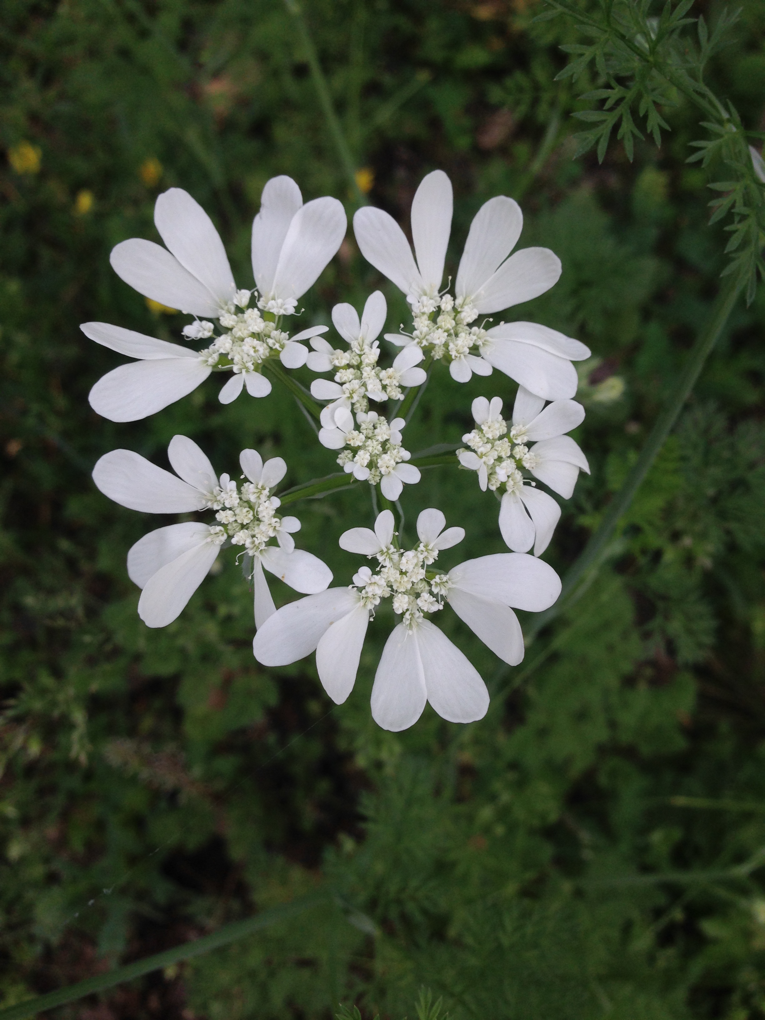 Orlaya grandiflora - Pilis, Hungary